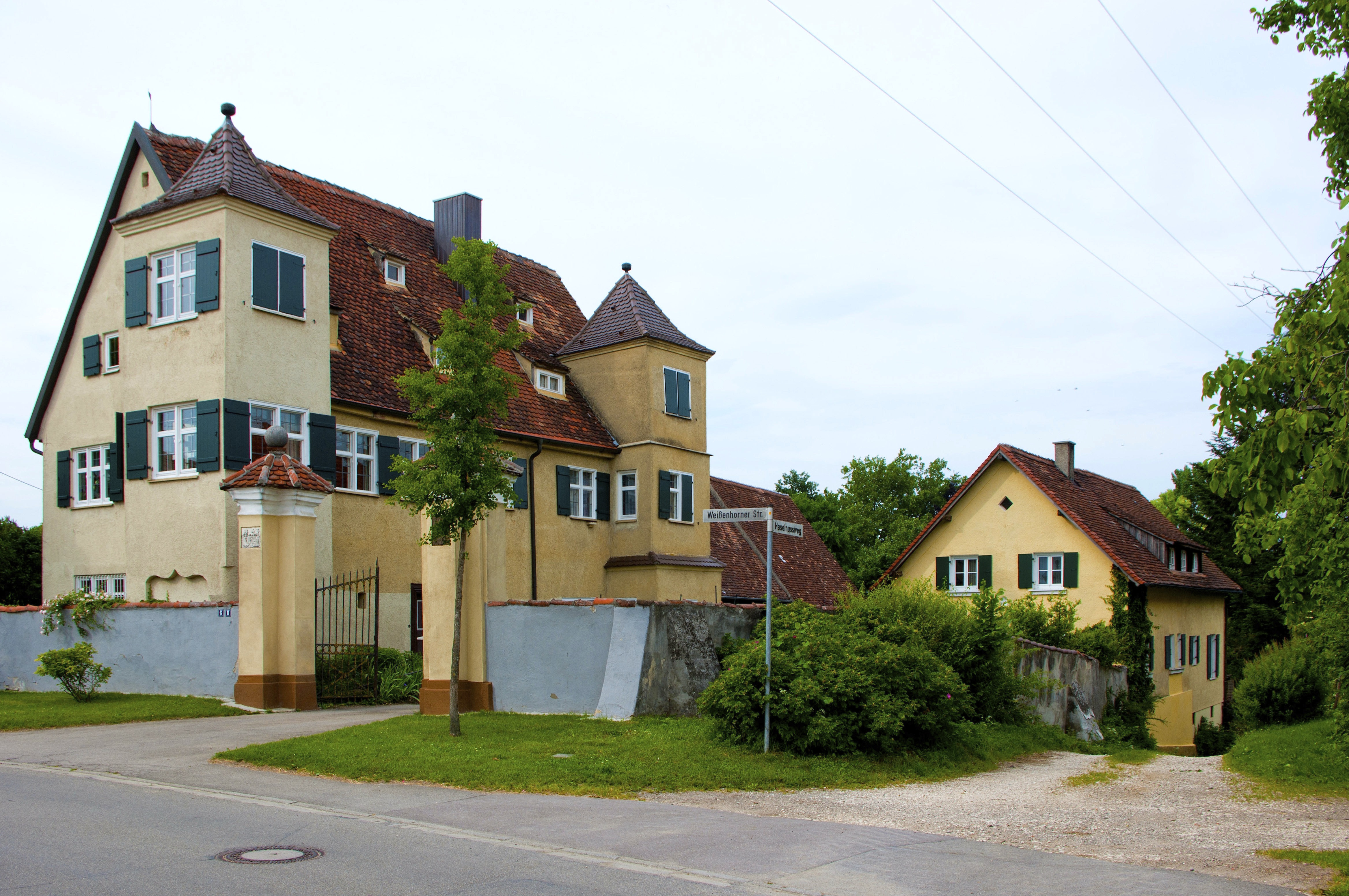 Patrizierschloss an der alten Straße nach Hittistetten, nach Mitte 16. Jahrhundert